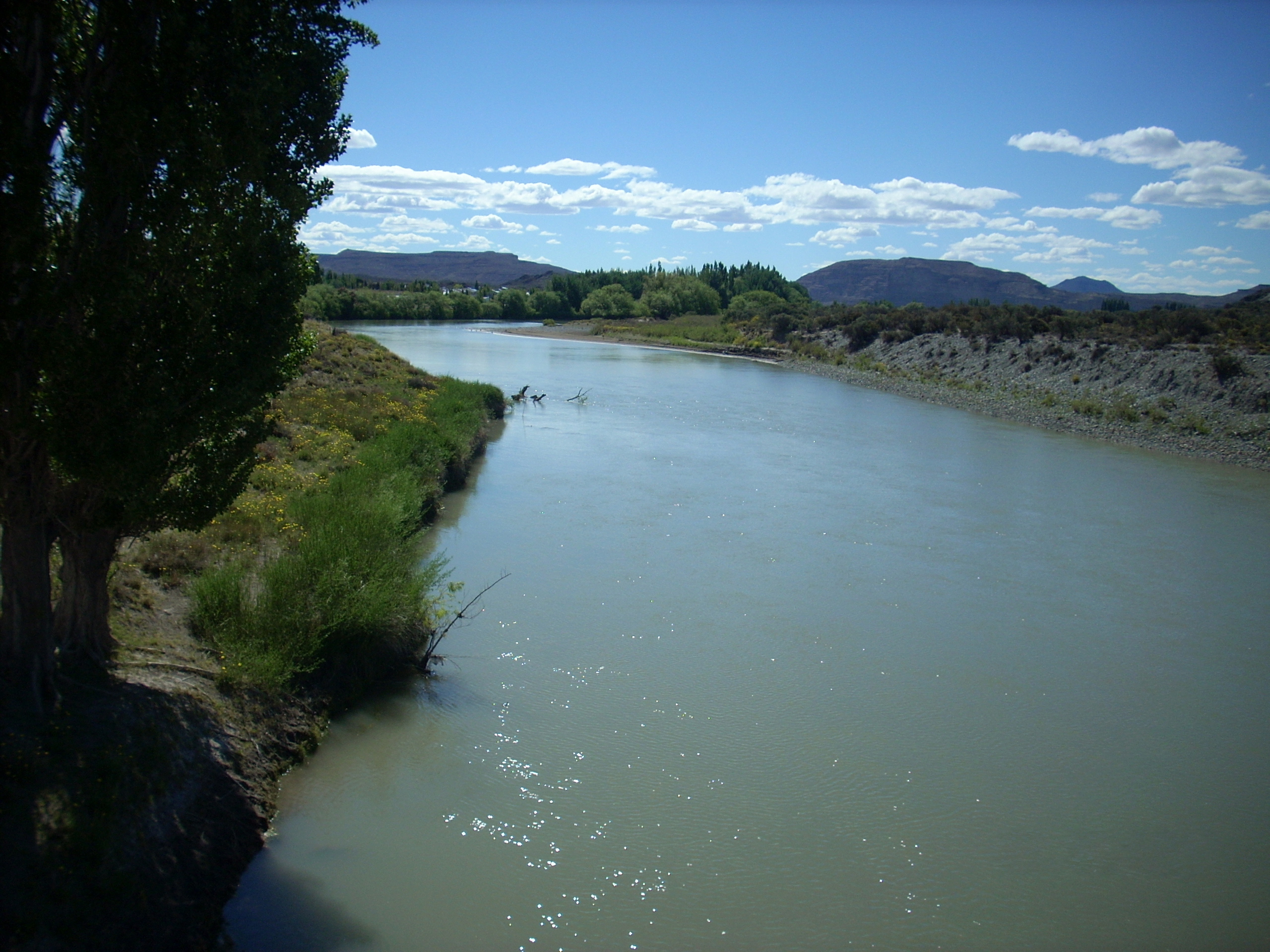 El rio Chubut desde las cercanías de Los Altares